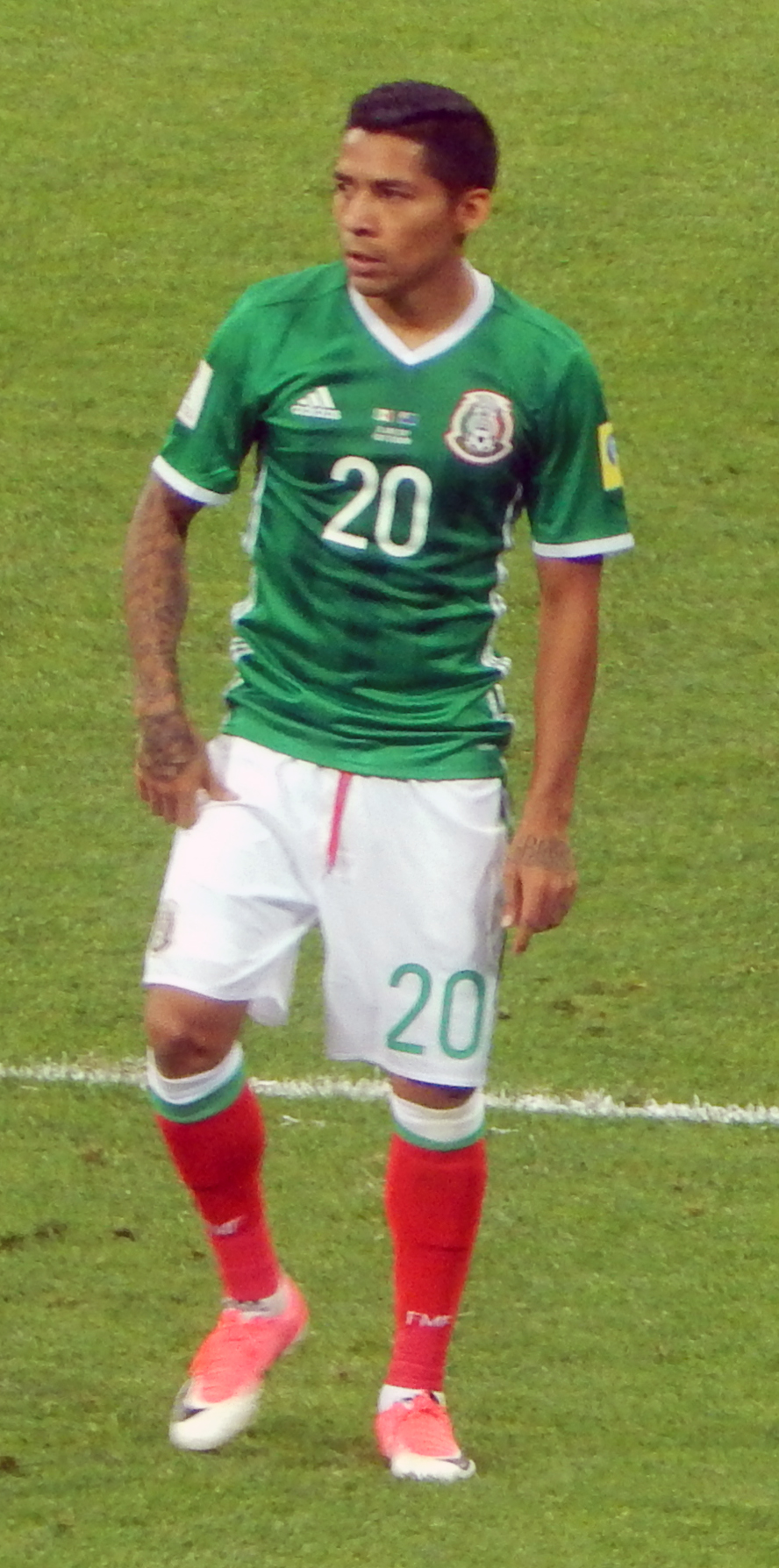 Хавьер Акино в матче против сборной Новой Зеландии